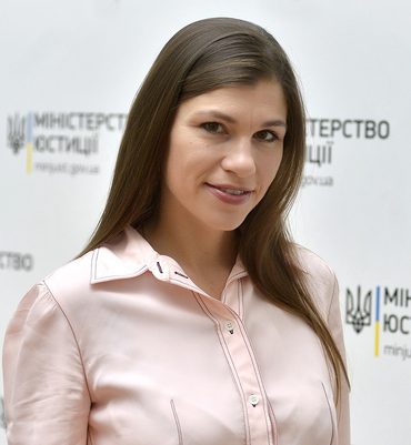 Ганна Буяджи (Онищенко) - державний секретар Міністерства юстиції України